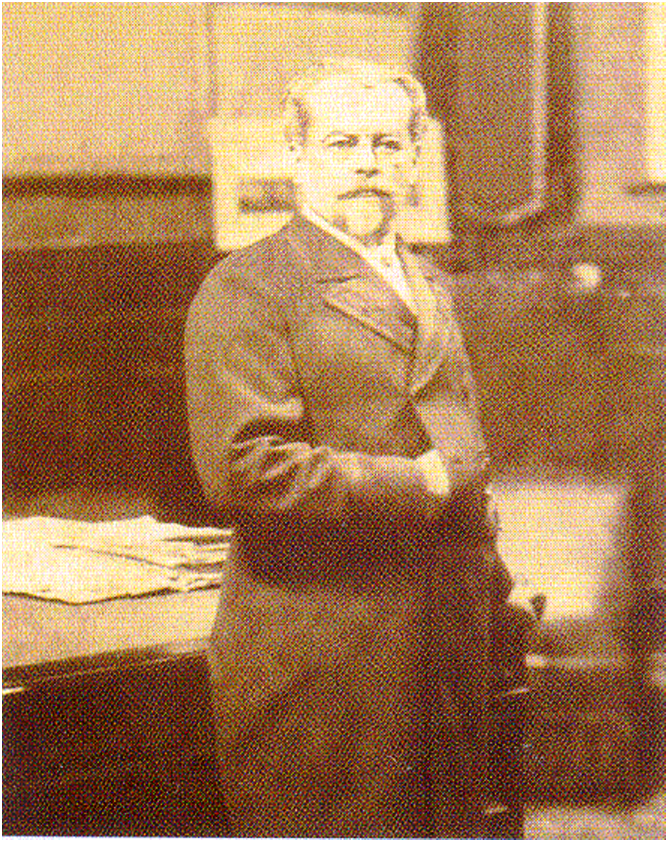 Nicolás de Piérola en su 2º gob. (1895-1899)